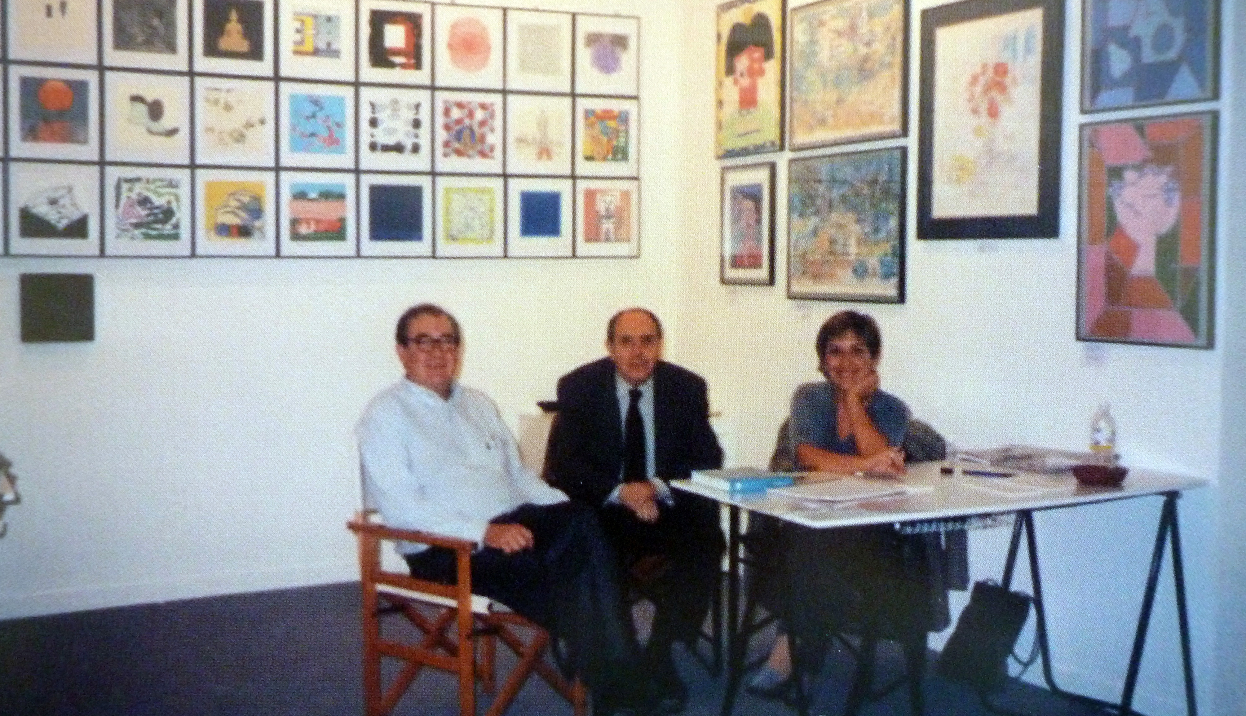 En Cuenca confluye un riquísimo caudal cultural y artístico durante el último cuarto del siglo xx.